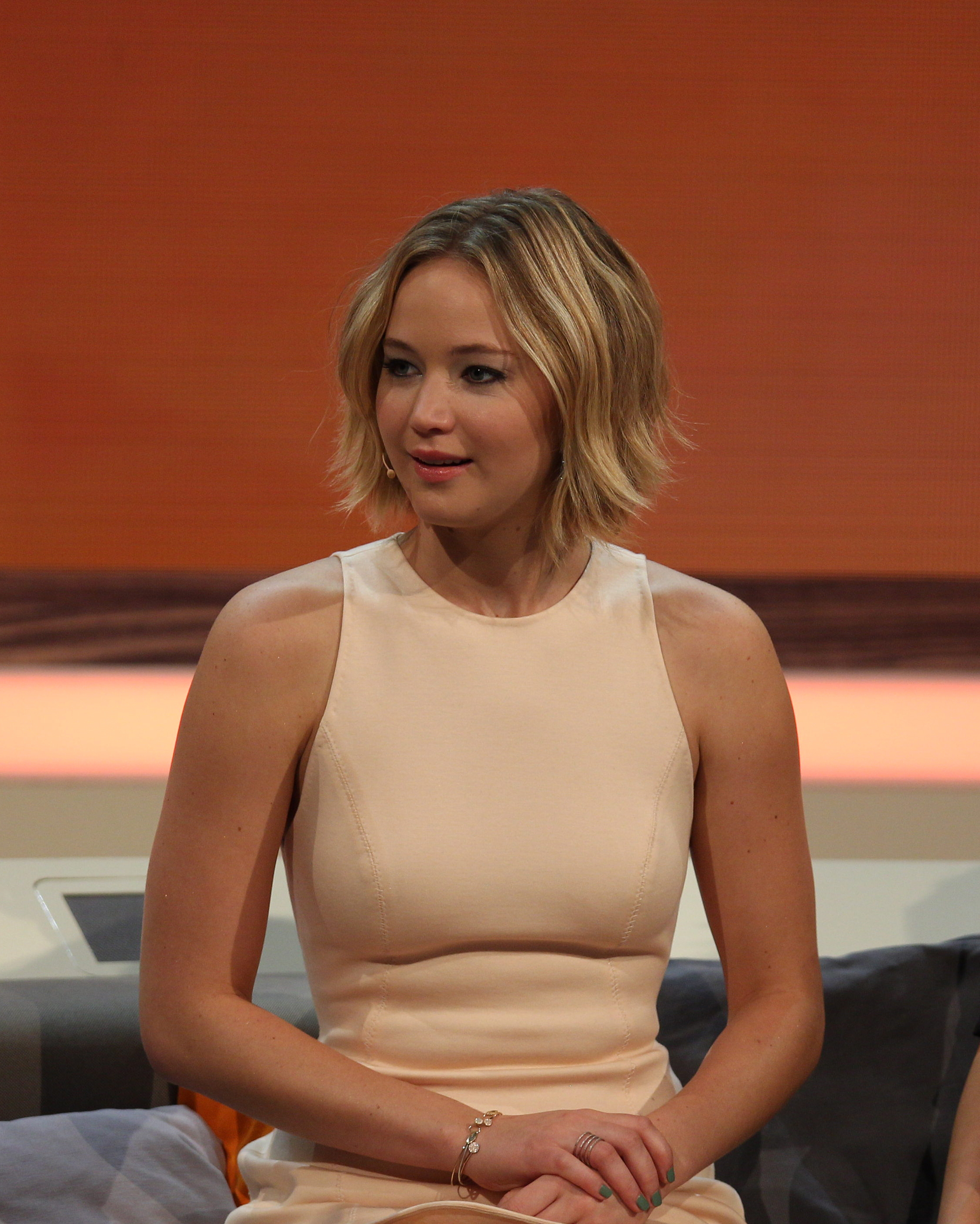 Wetten, dass.. ? 214. show in Graz, 8. Nov. 2014 Jennifer Lawrence at 214. Wetten, dass.. ? show in Graz, 8. Nov. 2014